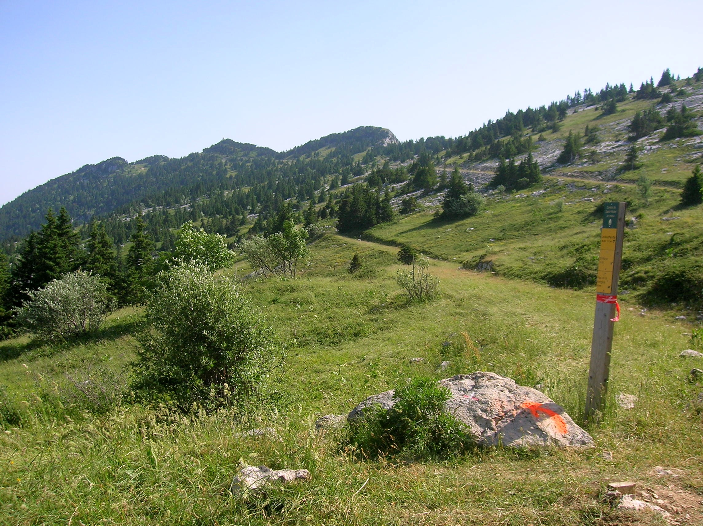 Saint-Nizier-du-Moucherotte, Isère, France.